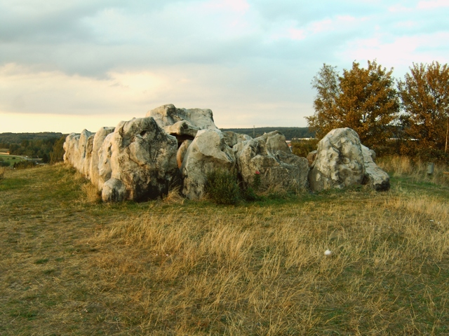 Lübbensteine Nordgrab Aufnahmemodalitäten: Standort: Lübbensteine (Niedersachsen), 52.23083 N, 10.98689 O Kamera: Digitalkamera Medion MD 41066 5,18 Megapixel (2560x1920), 1-fach Zoom eingestellt (entspricht Kleinbild-Brennweite 37 mm), Blende 6.7 Belichtungszeit: 1/21 s